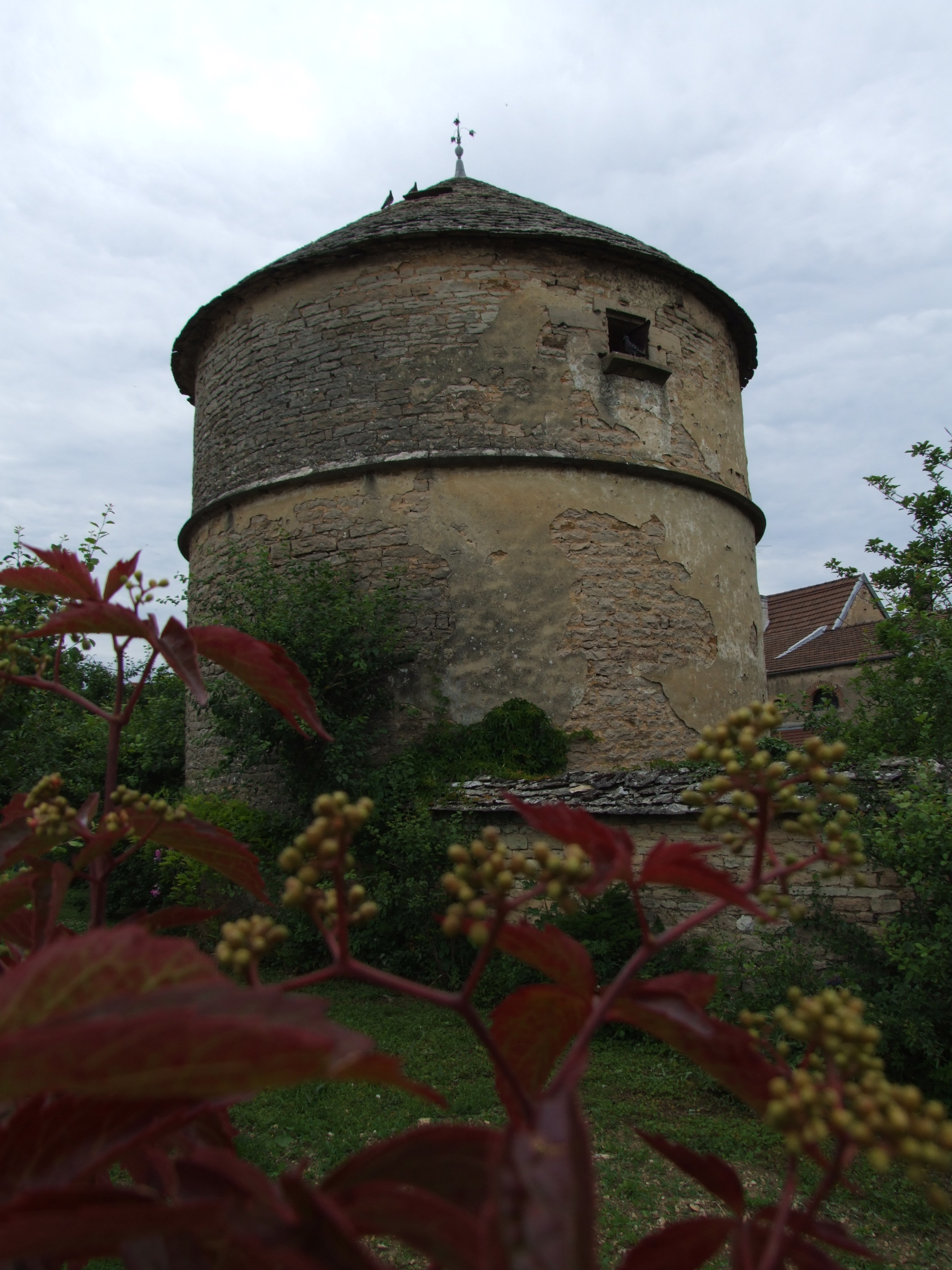 Colombier Saint-Urbain, Marsannay-la-Côte, Côte-d'Or, Bourgogne,FRANCE